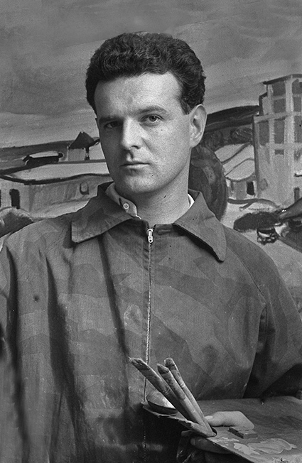 Jan Šplíchal, portrét Ladislava Karouška